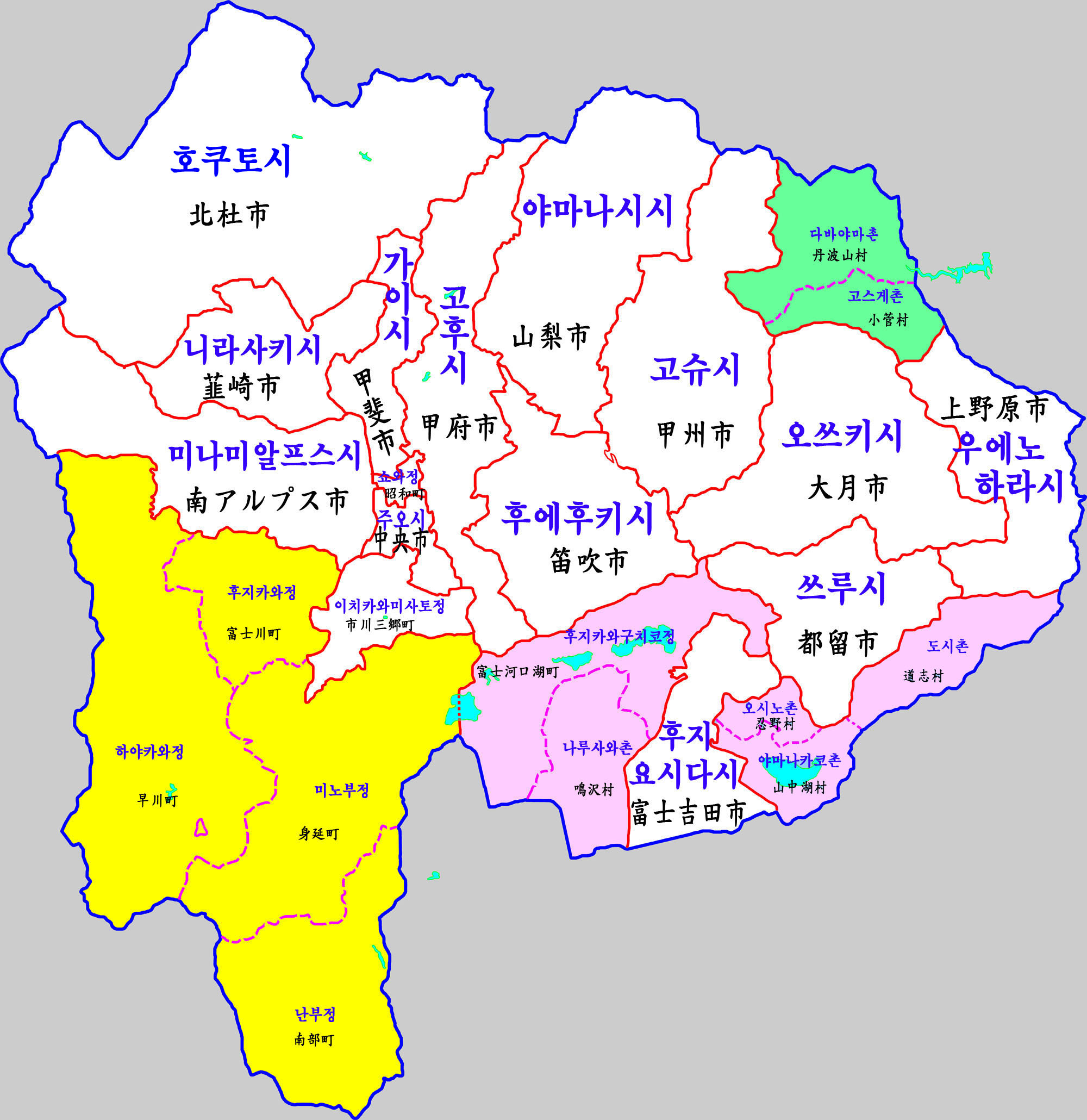 야마나시현 행정구역